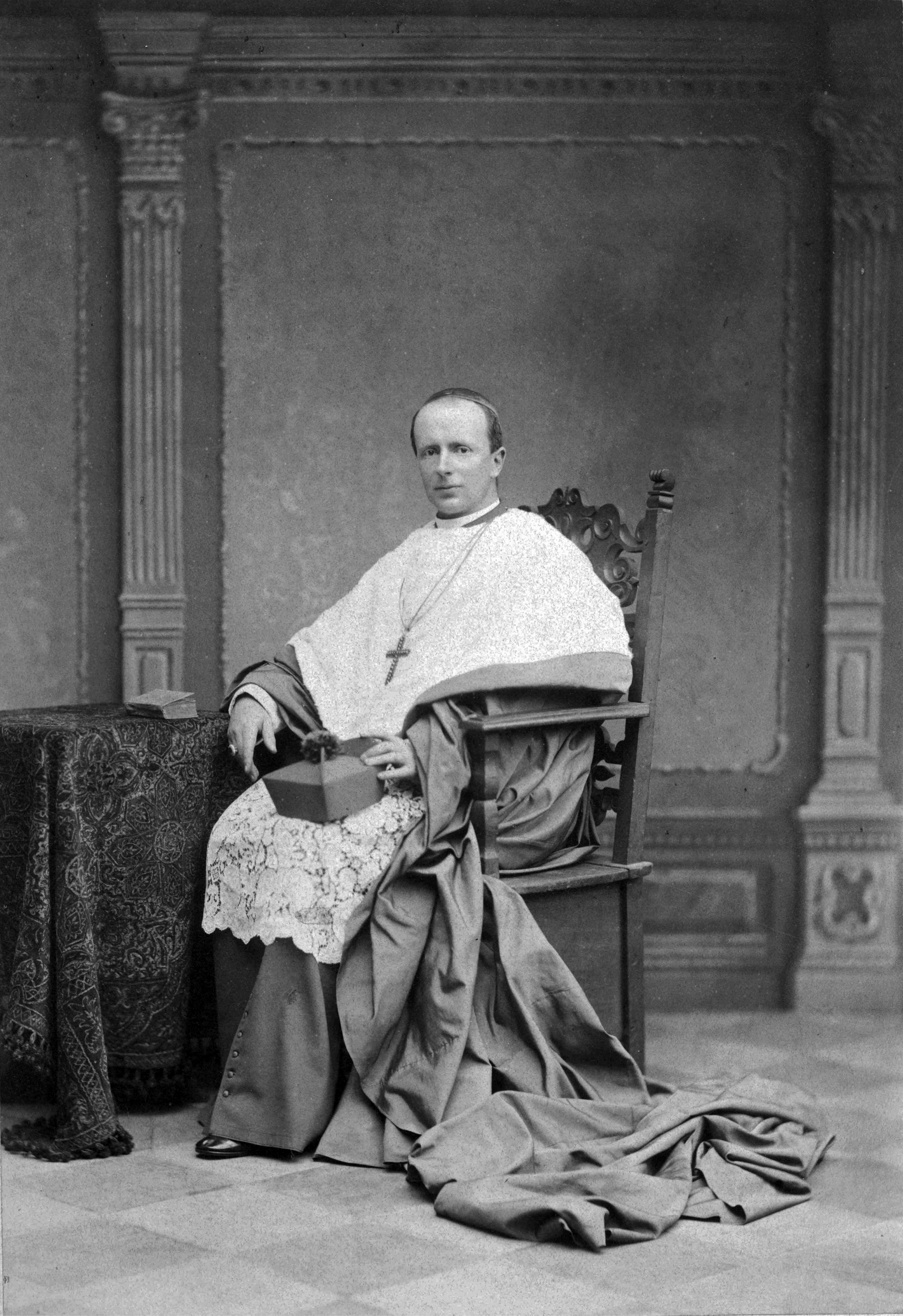 František z Pauly kardinál hrabě Schönborn-Buchheim-Wolfsthal